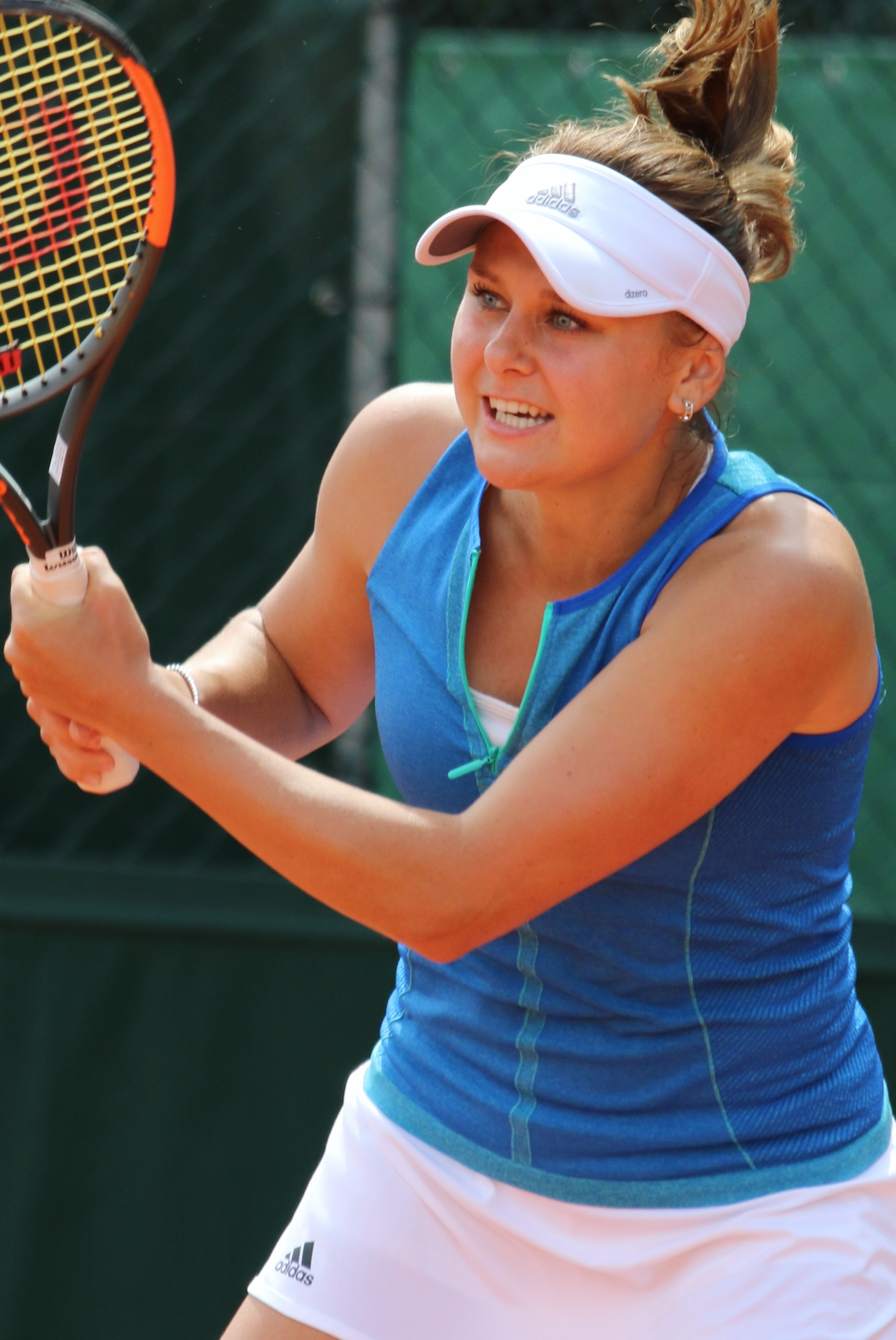 Kozlova RG18 (20)